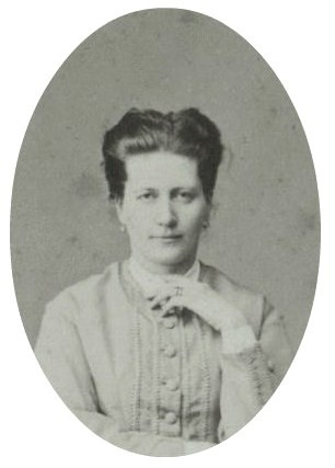 Княгиня Мария Павловна Щербатова, ур. Муханова (1836—11.12.1892)